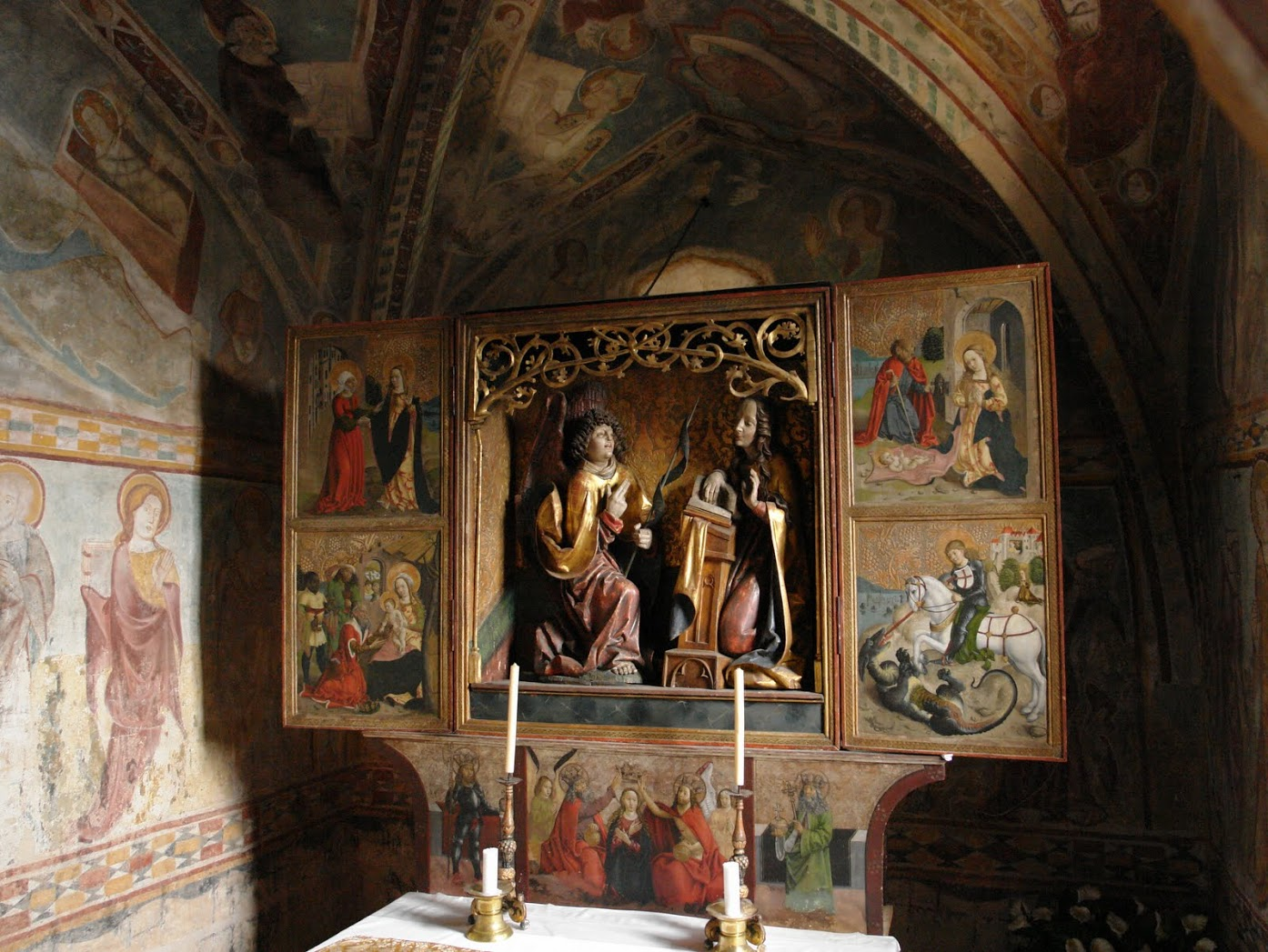 Chyžné, kostol Zvestovania Panne Márii